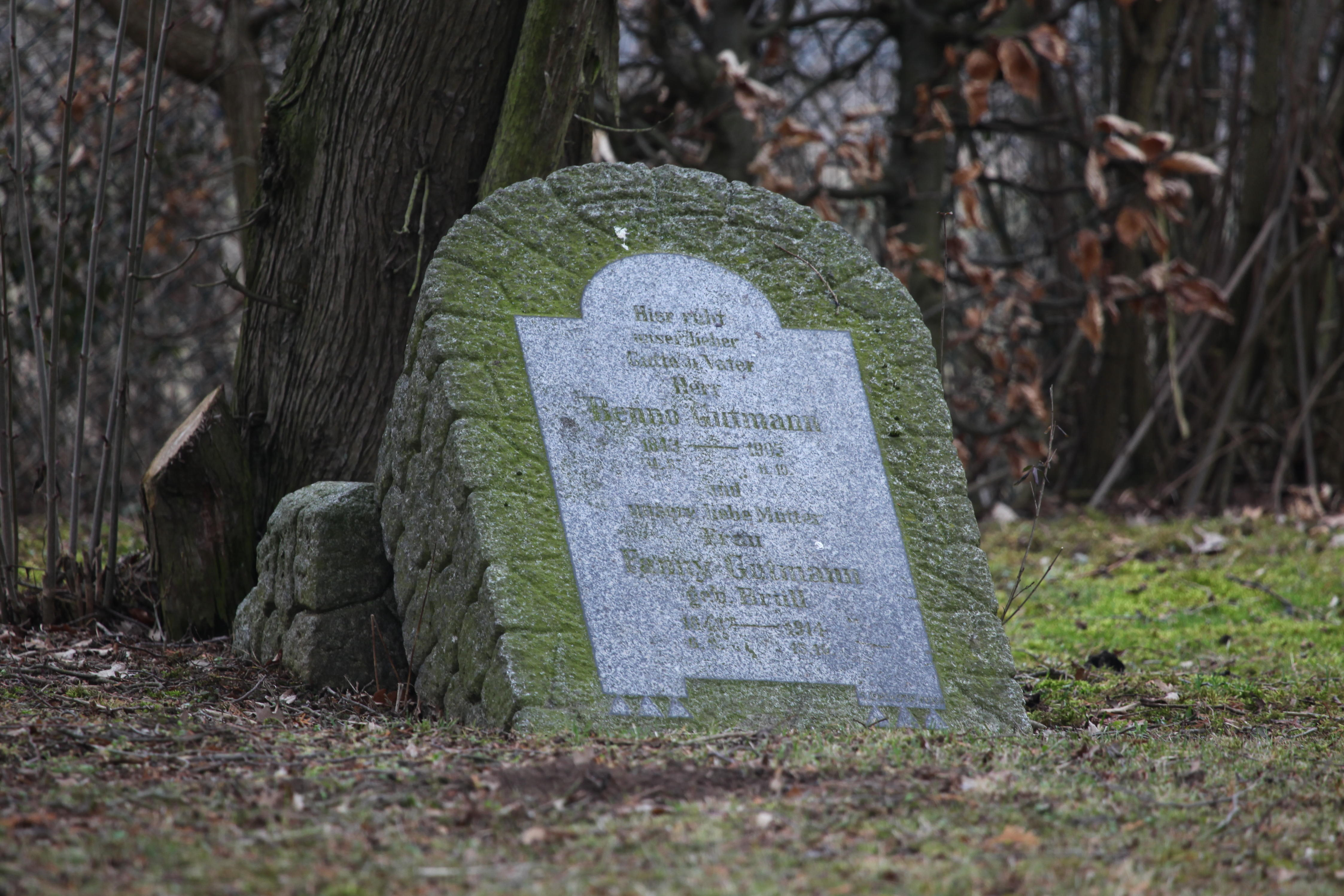 Lichtenfels, Landkreis Lichtenfels, Grabstein auf dem Jüdischen Friedhof